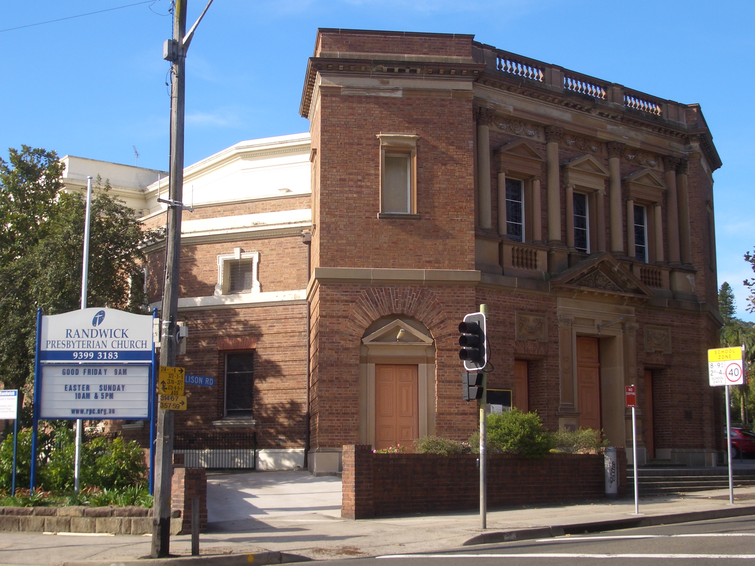 Randwick